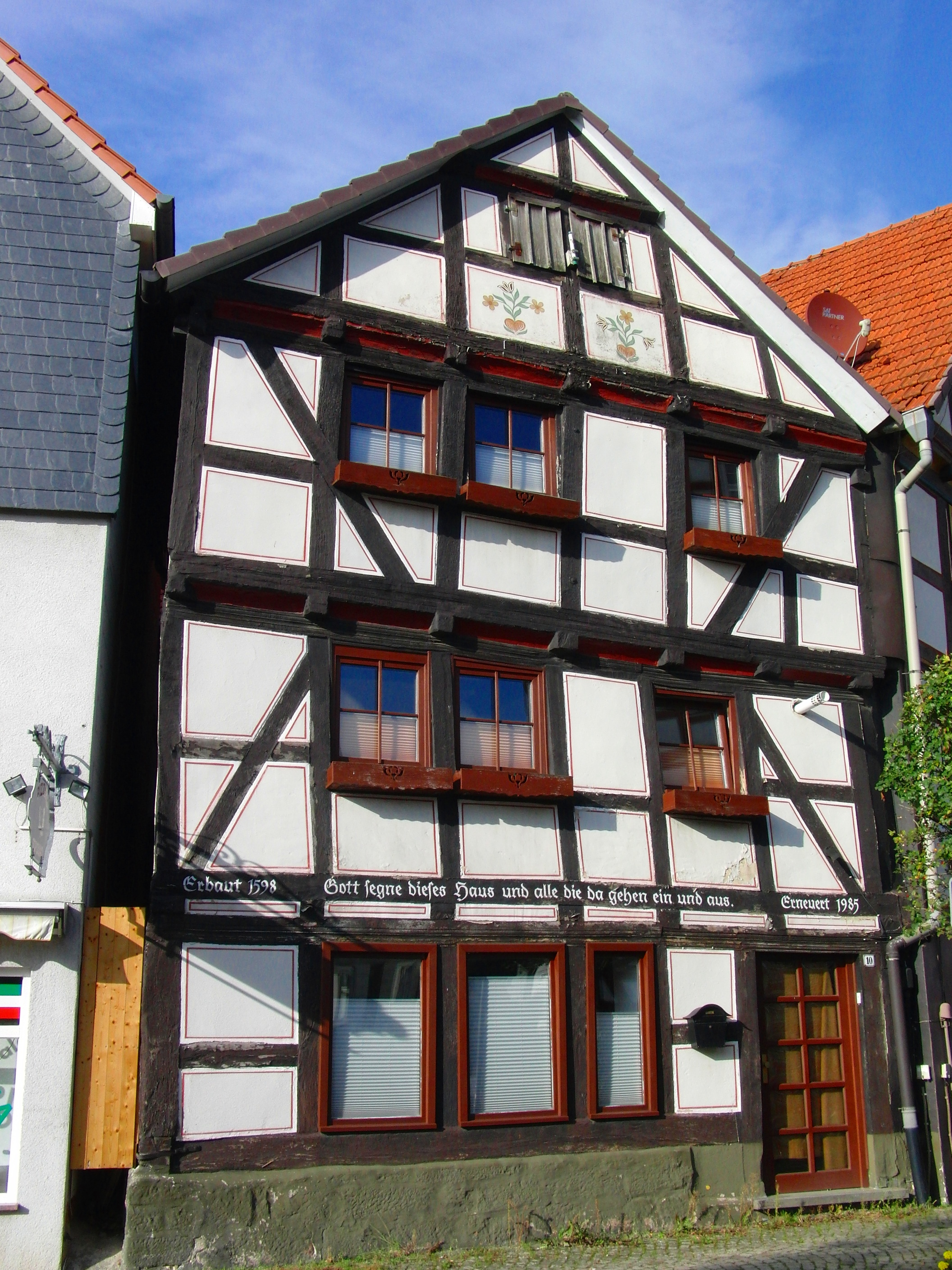 Altes Fachwerkhaus in Neukirchen (Knüll) in der Nähe der Nikolaikirche, erbaut 1598, erneuert 1985 (siehe Aufschrift)